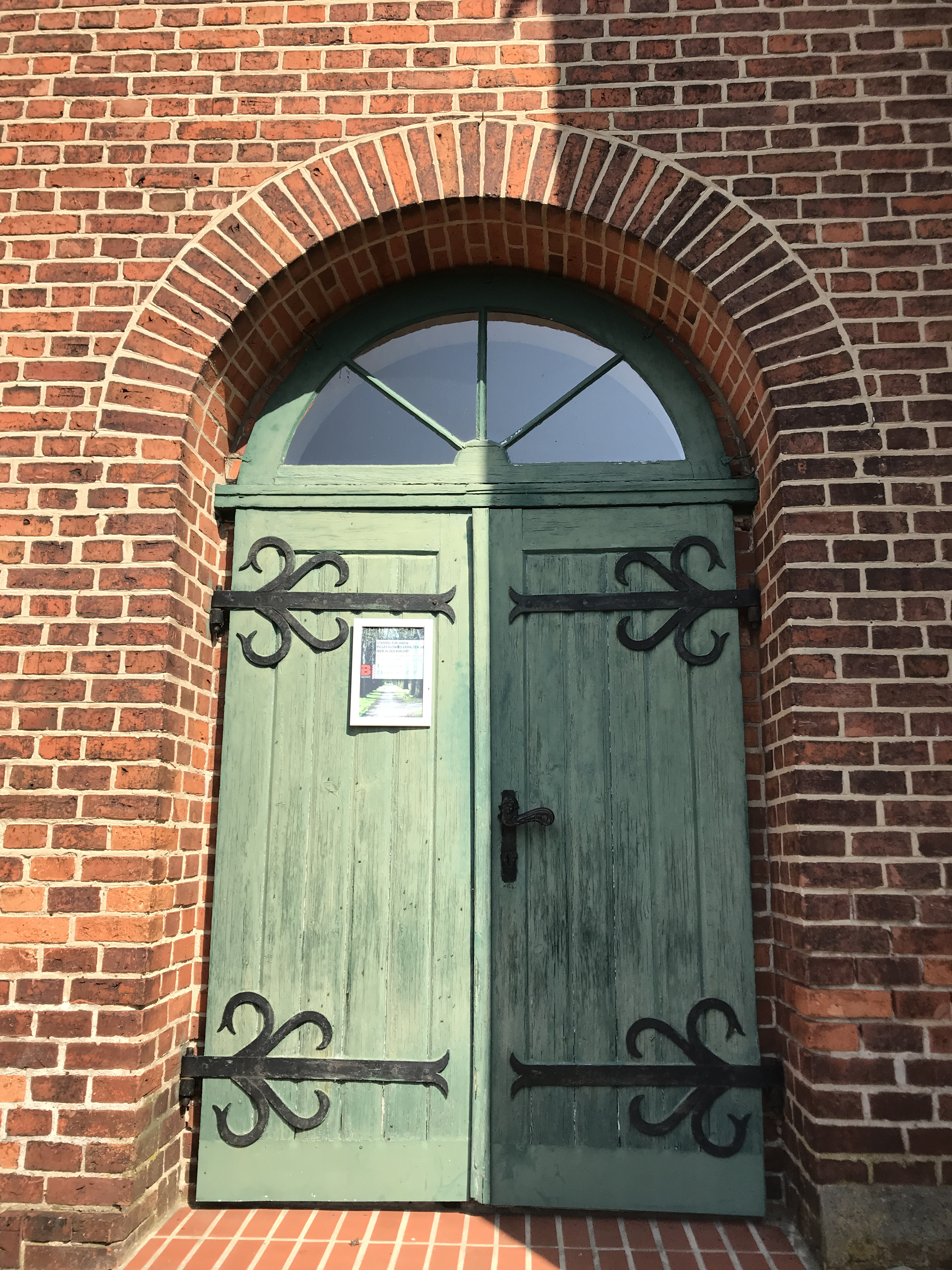 Die Dorfkirche Emstal ist eine Saalkirche in Emstal, einem Ortsteil der Gemeinde Kloster Lehnin im Land Brandenburg. Kanzel, Altar und Taufstein stammen aus dem Jahr 1964 und wurden einheitlich aus roten Ziegeln errichtet.